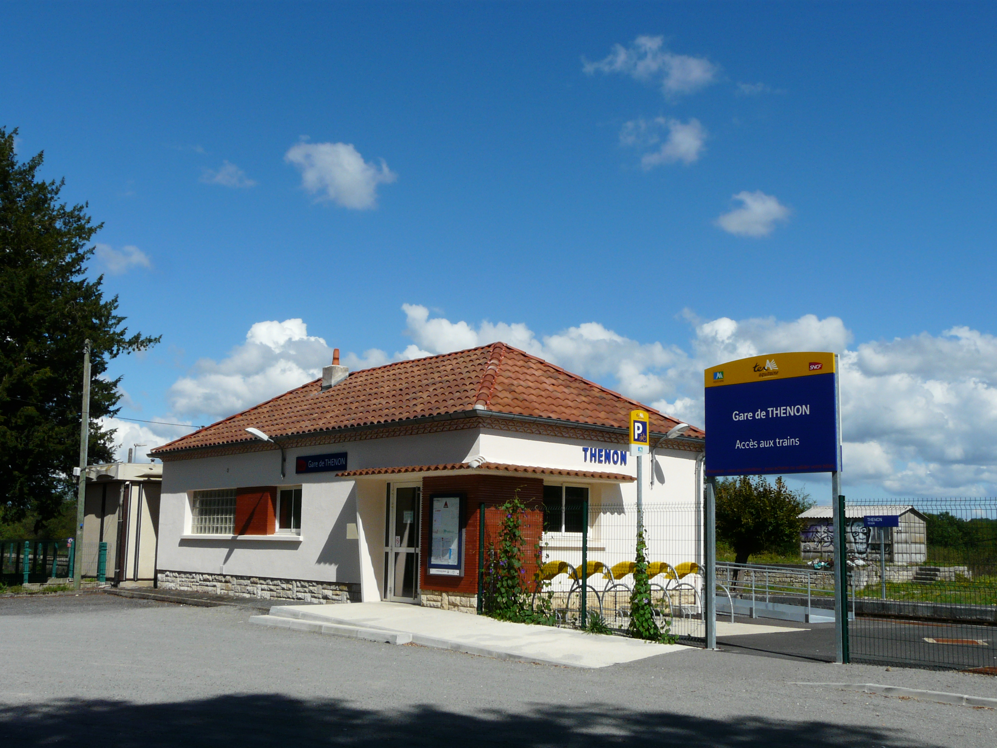 La gare de Thenon, Dordogne, France.